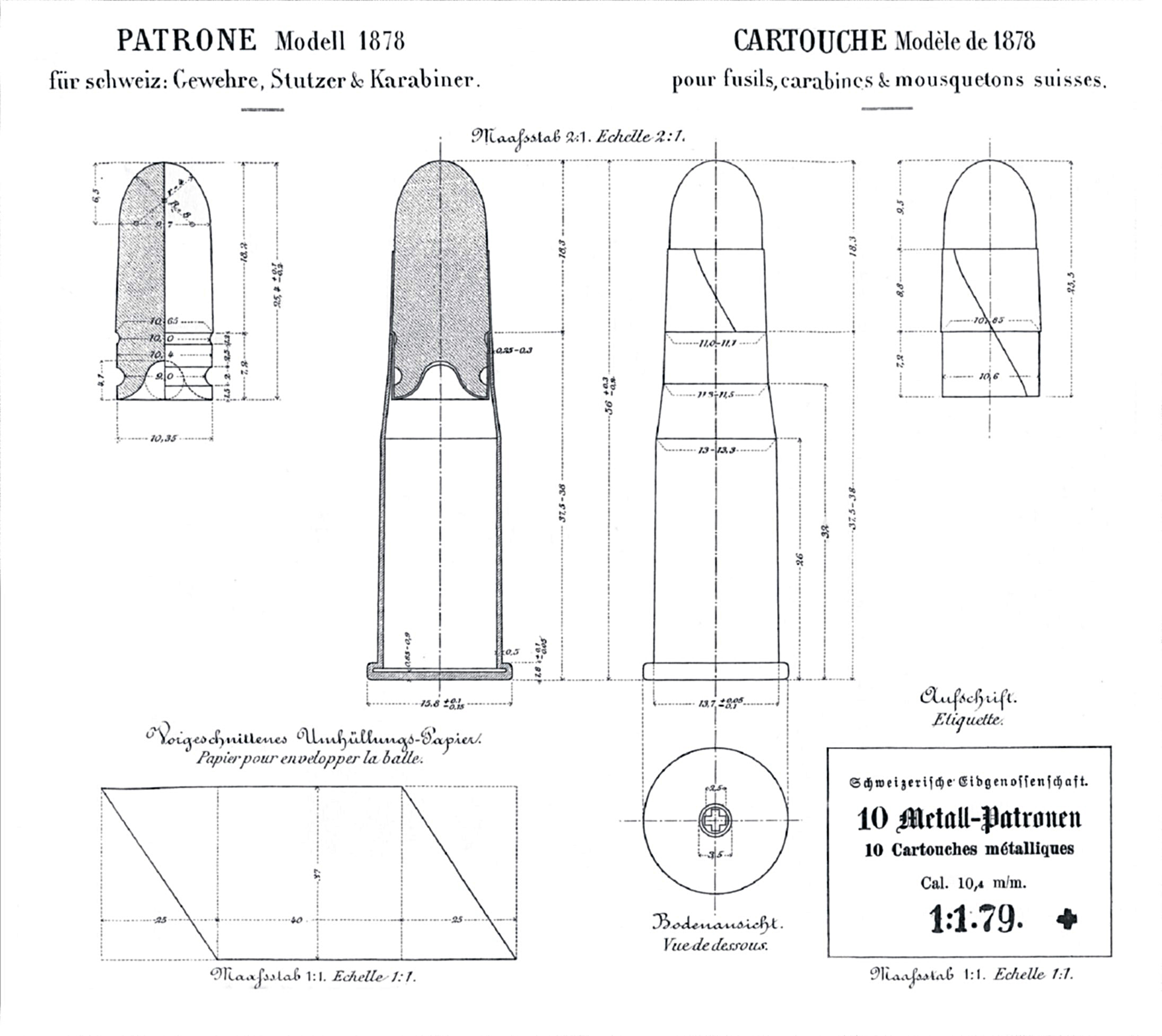 Planches de l'ordonnance sur les munitions de fusils et de revolvers 10.4mm modèle de 1878